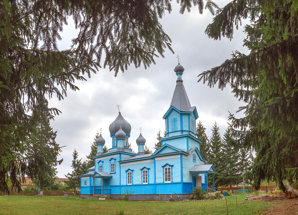 Панорама церкви